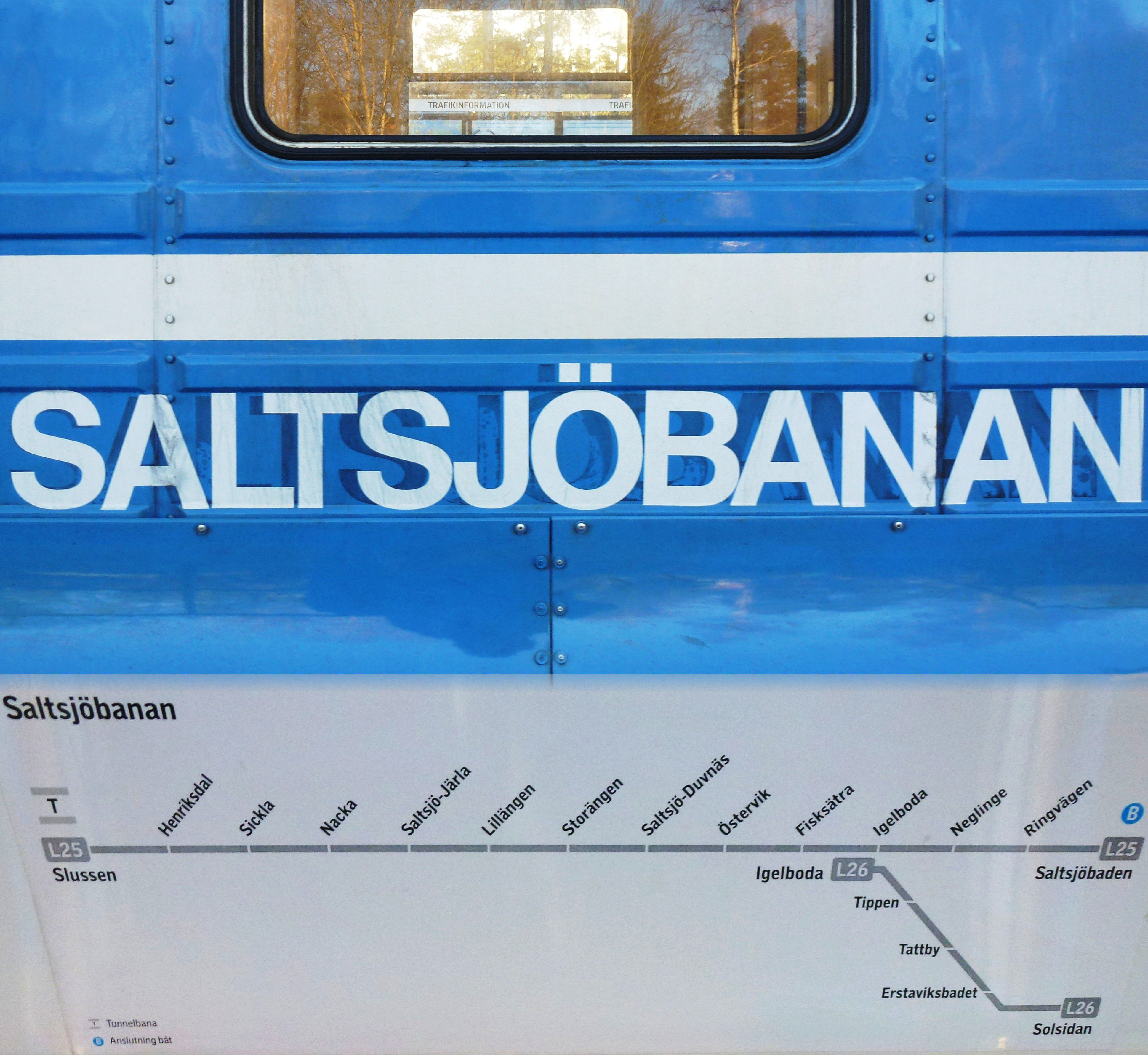 Saltsjöbanan kollage med linjekartan